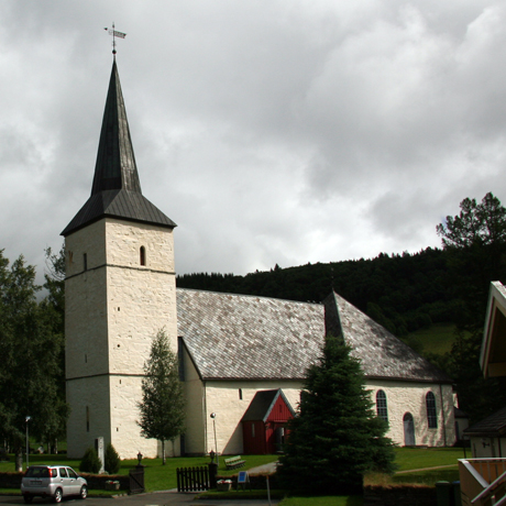 Selbu Church